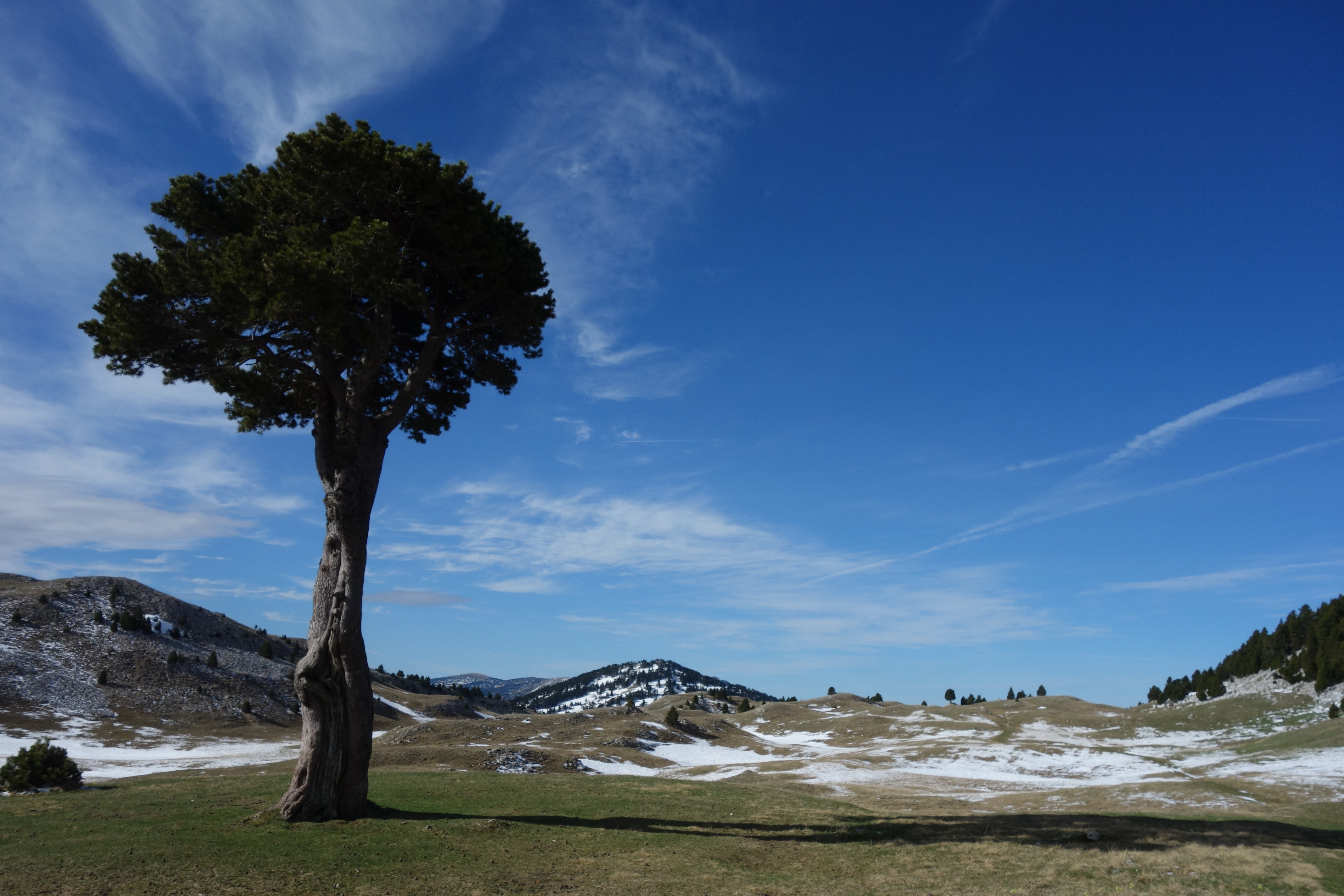 Réserve naturelle nationale des hauts plateaux du Vercors. L'arbre taillé de la Queyrie.